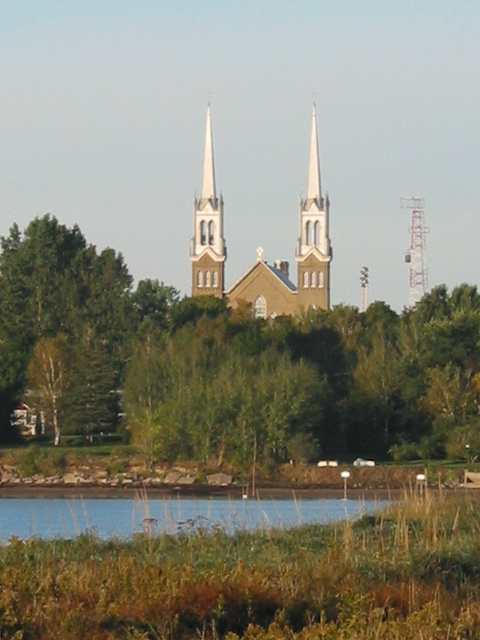 Église de Tracadie